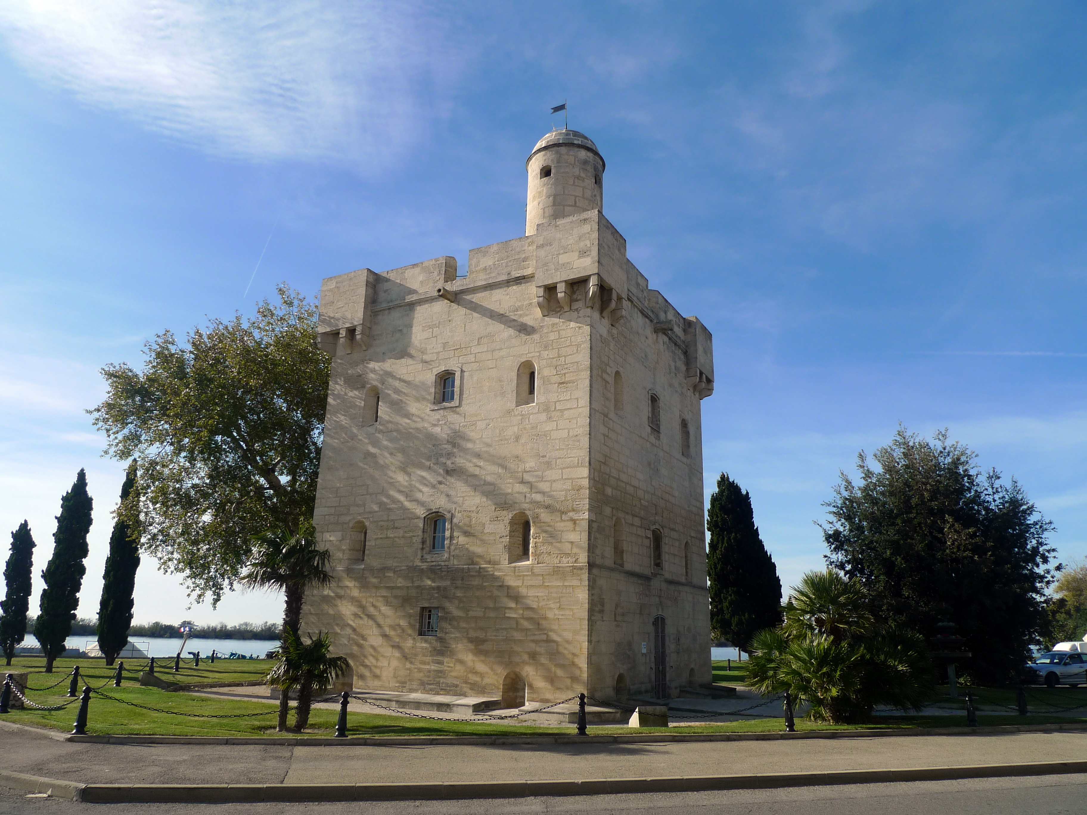 Tour Saint-Louis construite en 1737 par l'ingénieur militaire Mareschal